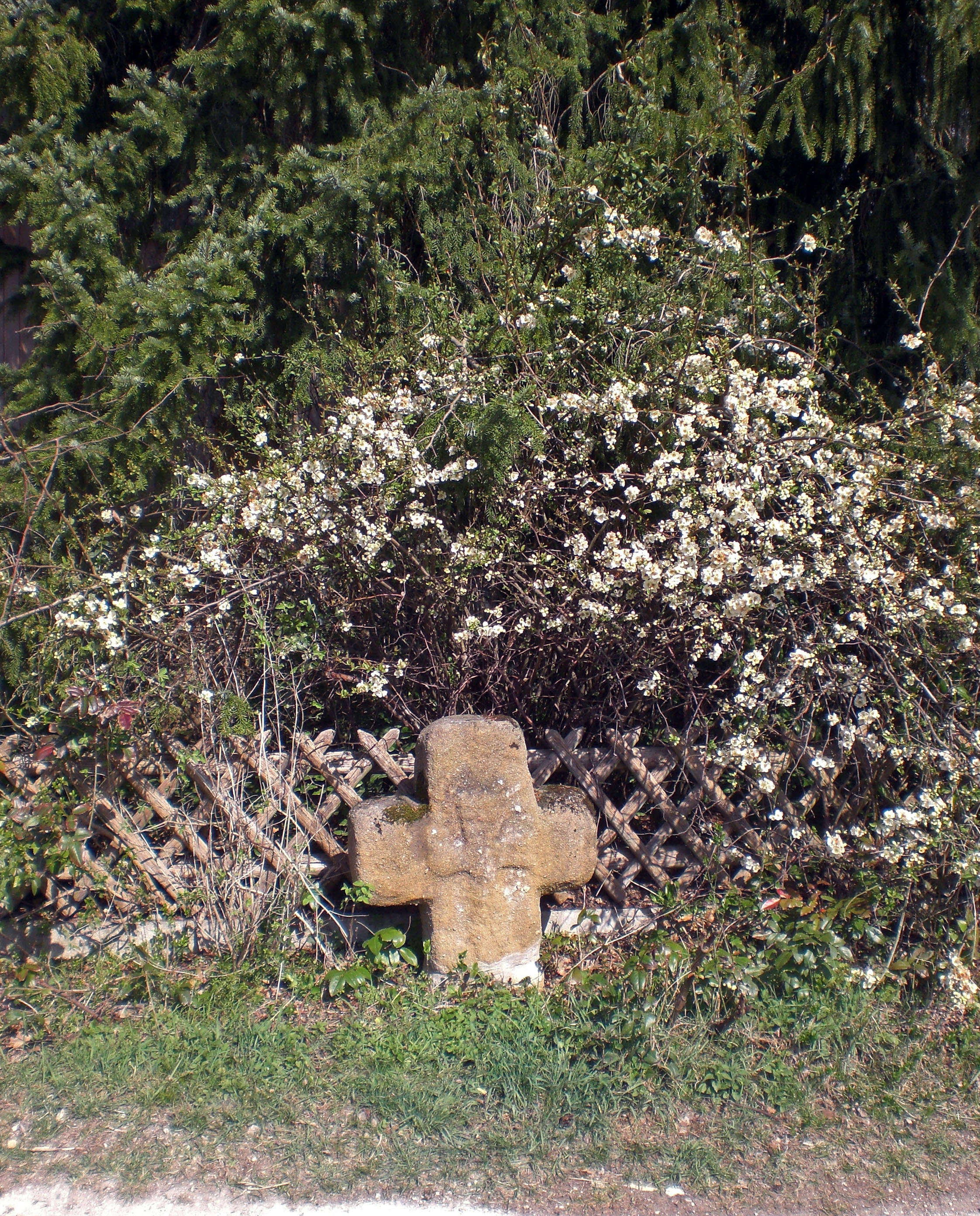 Sühnekreuz, Sperberslohe